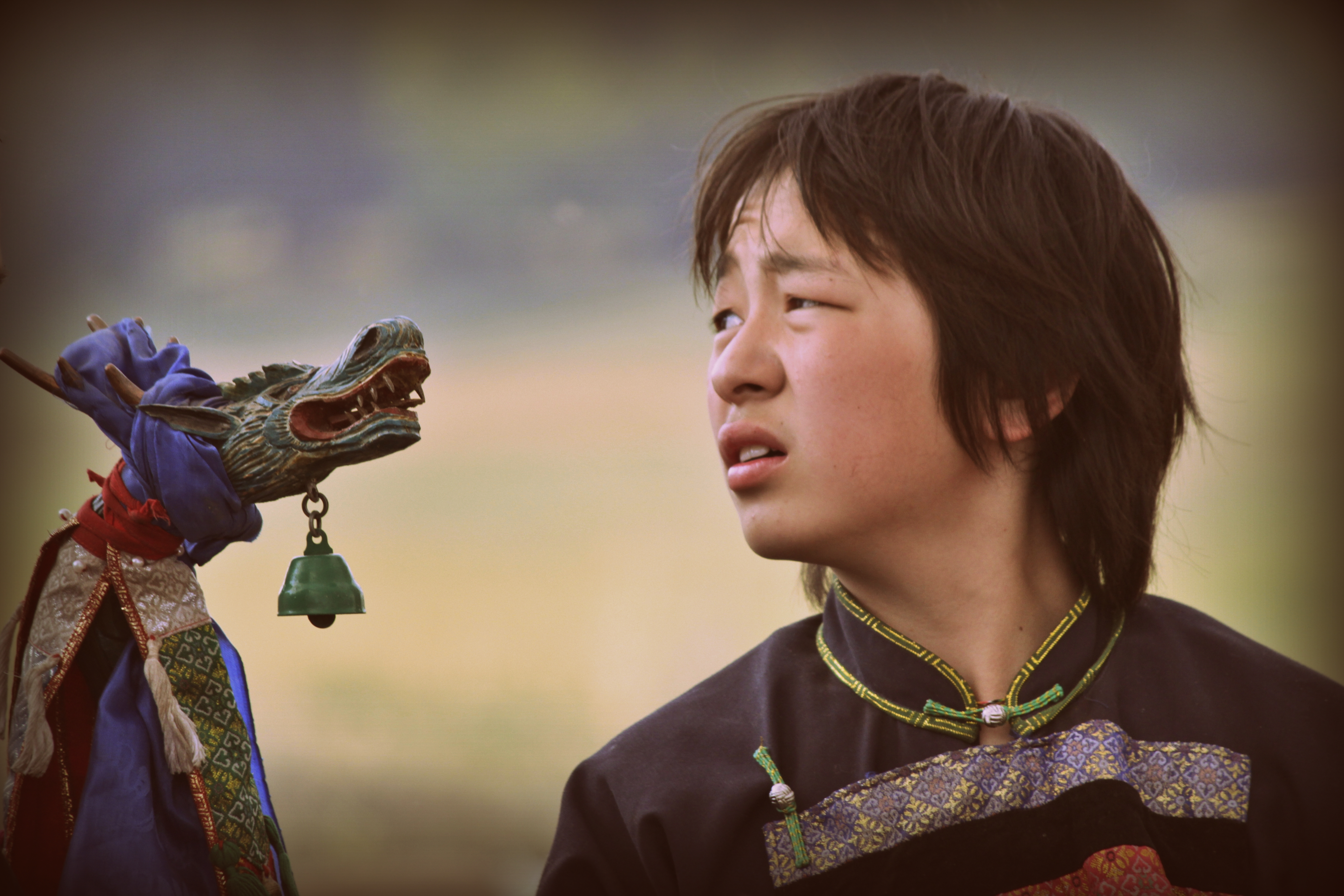 Аян Цыбикжапов на шаманском обряде Шандруу